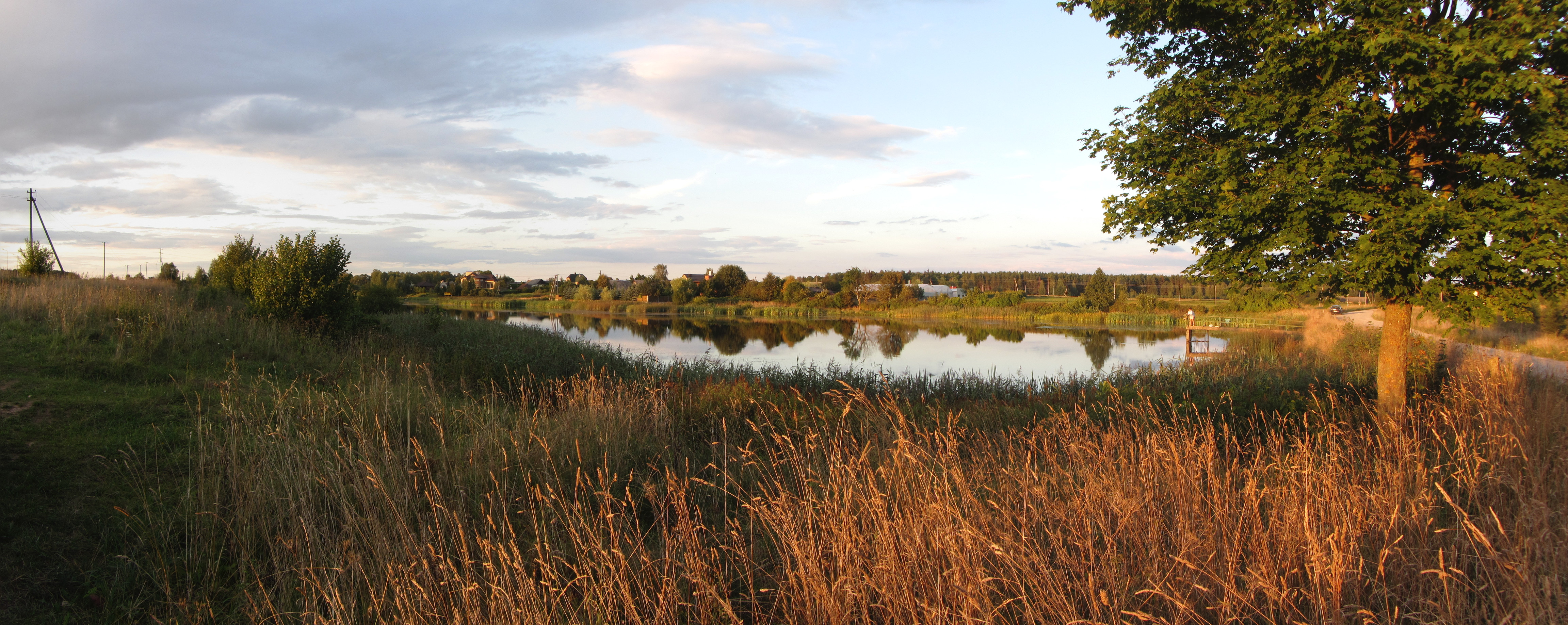 Raudondvaris, Lithuania